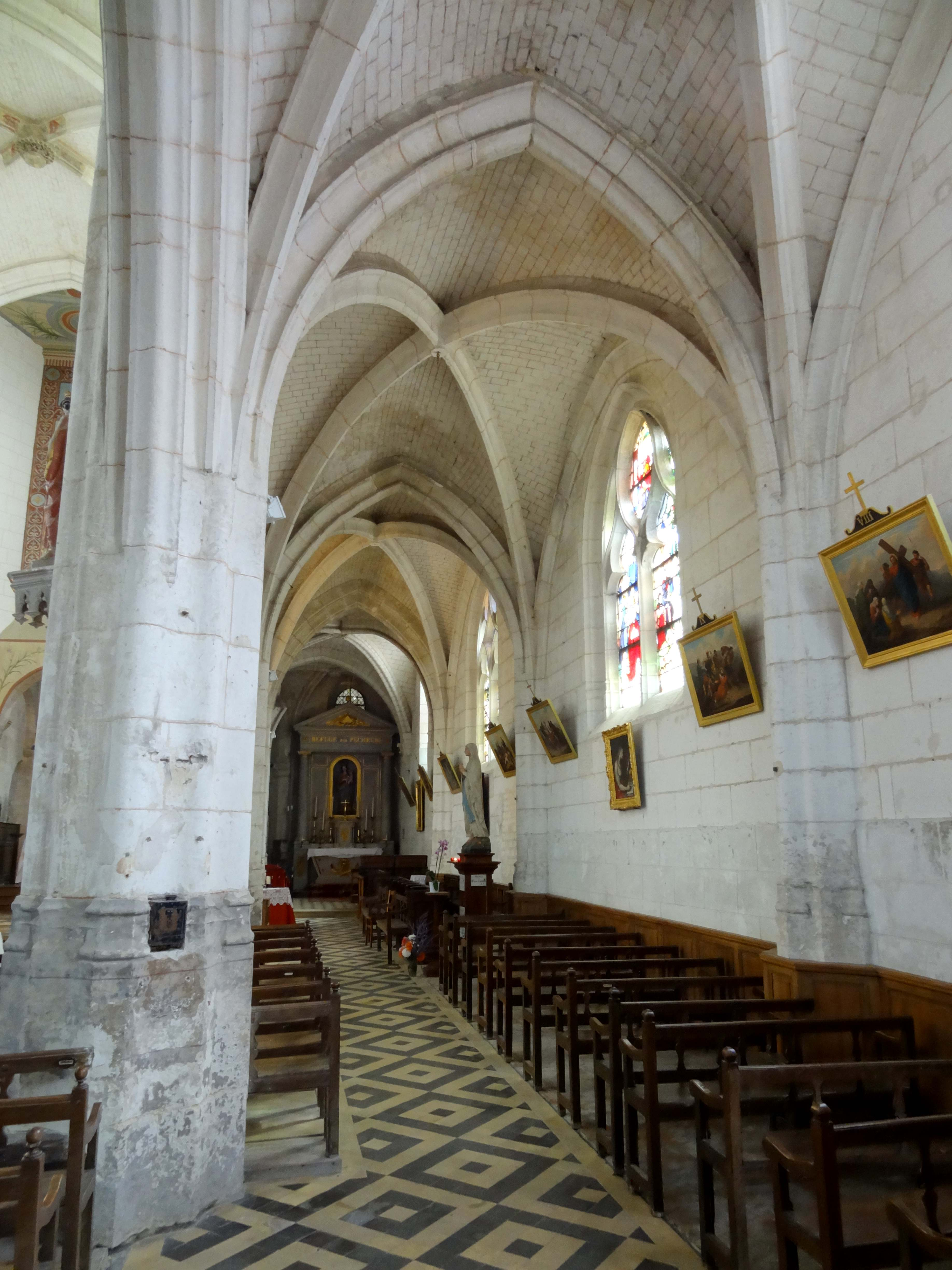 Intérieur de l'église - voir titre.